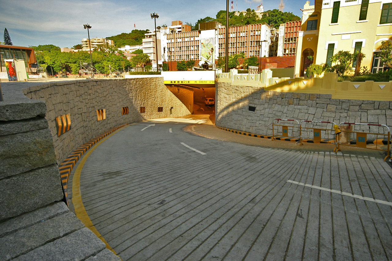 Praca do Tap Seac